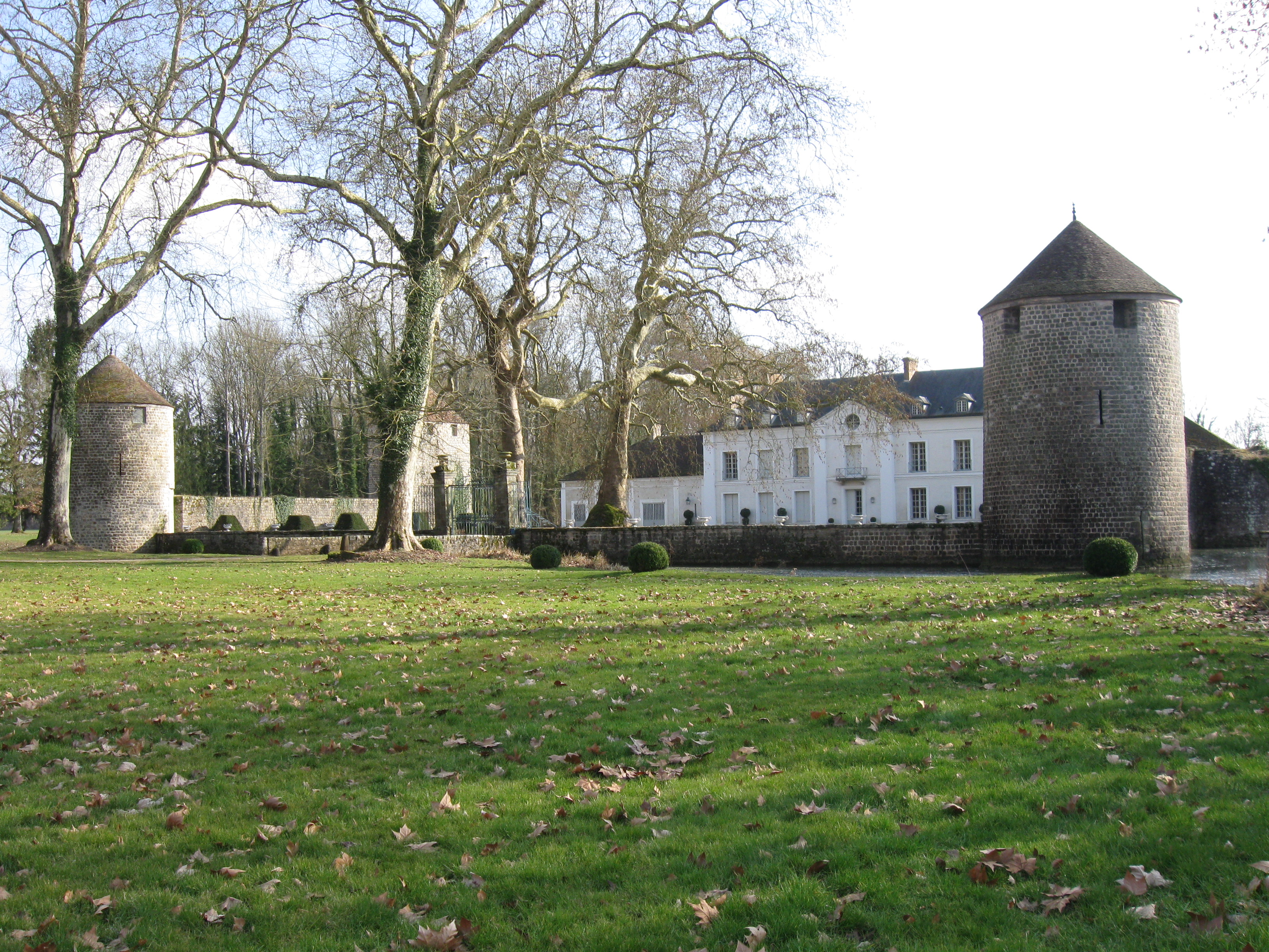 Manoir féodal de Diant. (Seine-et-Marne, région Île-de-France).